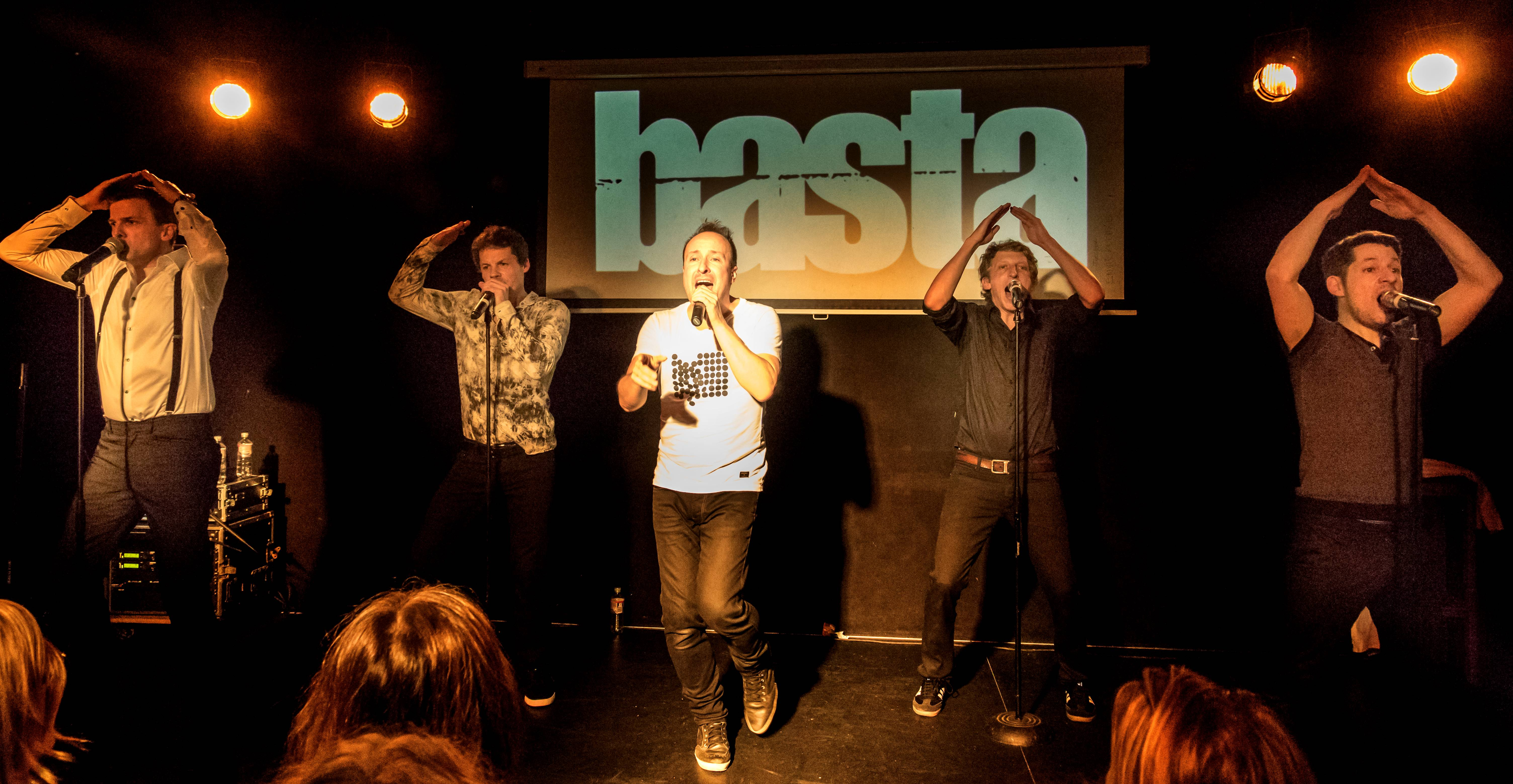 Bilder vom Konzert in Freiburg i. Br. Die A capella Gruppe Basta am 01. März 2015